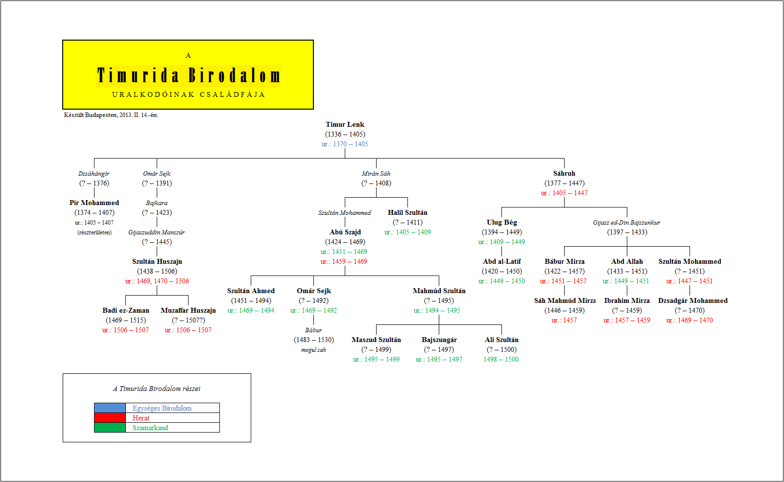 A kép a Timurida Birodalom uralkodóinak családi kapcsolatait ábrázolja.